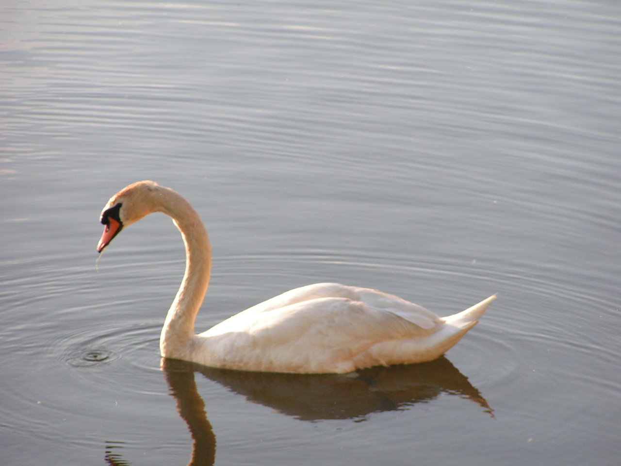 Beschreibung: Schwan im klaren Wasser Quelle: selbst fotografiert am 28.05.2005 Fotograf: Martin Drechsel Lizenzstatus